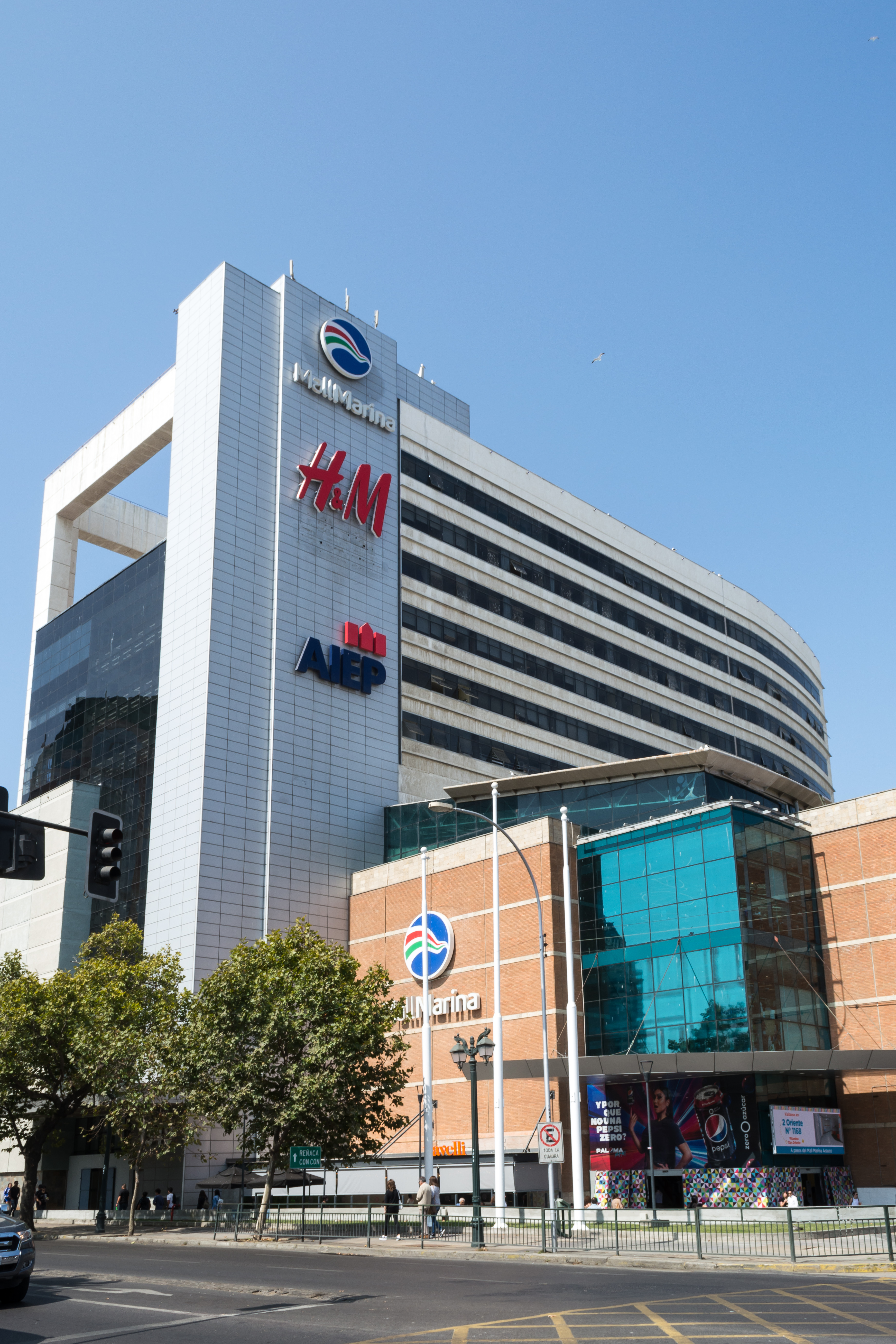 Mall Marina, Viña del Mar, Región de Valparaíso, Chile